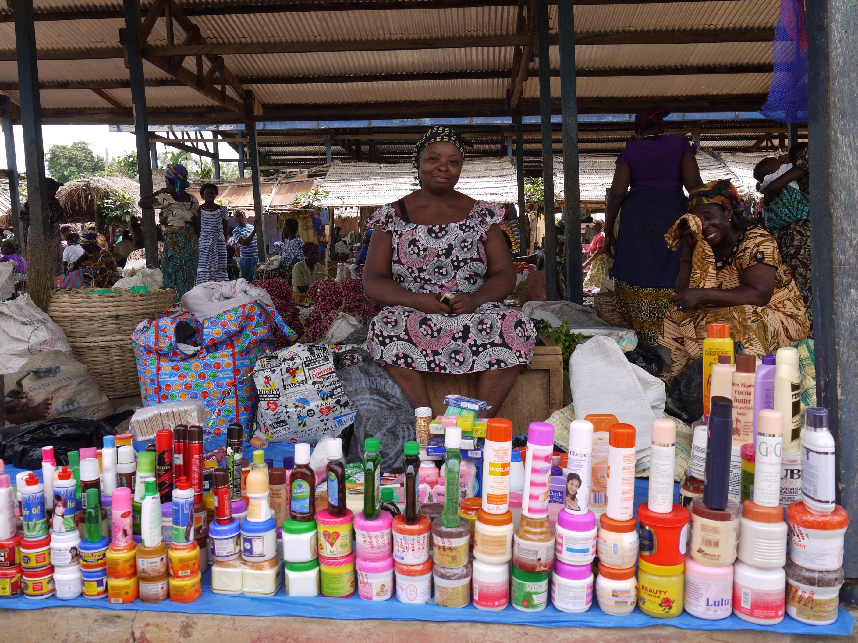 Market in Anaynui, Ghana